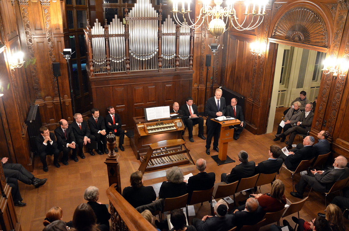 Zur Eröffnung der Ausstellung Israel Alter - der letzte Oberkantor von Hannover 2013 in der Villa Seligmann sprach Oberbürgermeister Stefan Schostok vor den Gästen rund um die „große Halle“ der Villa ...